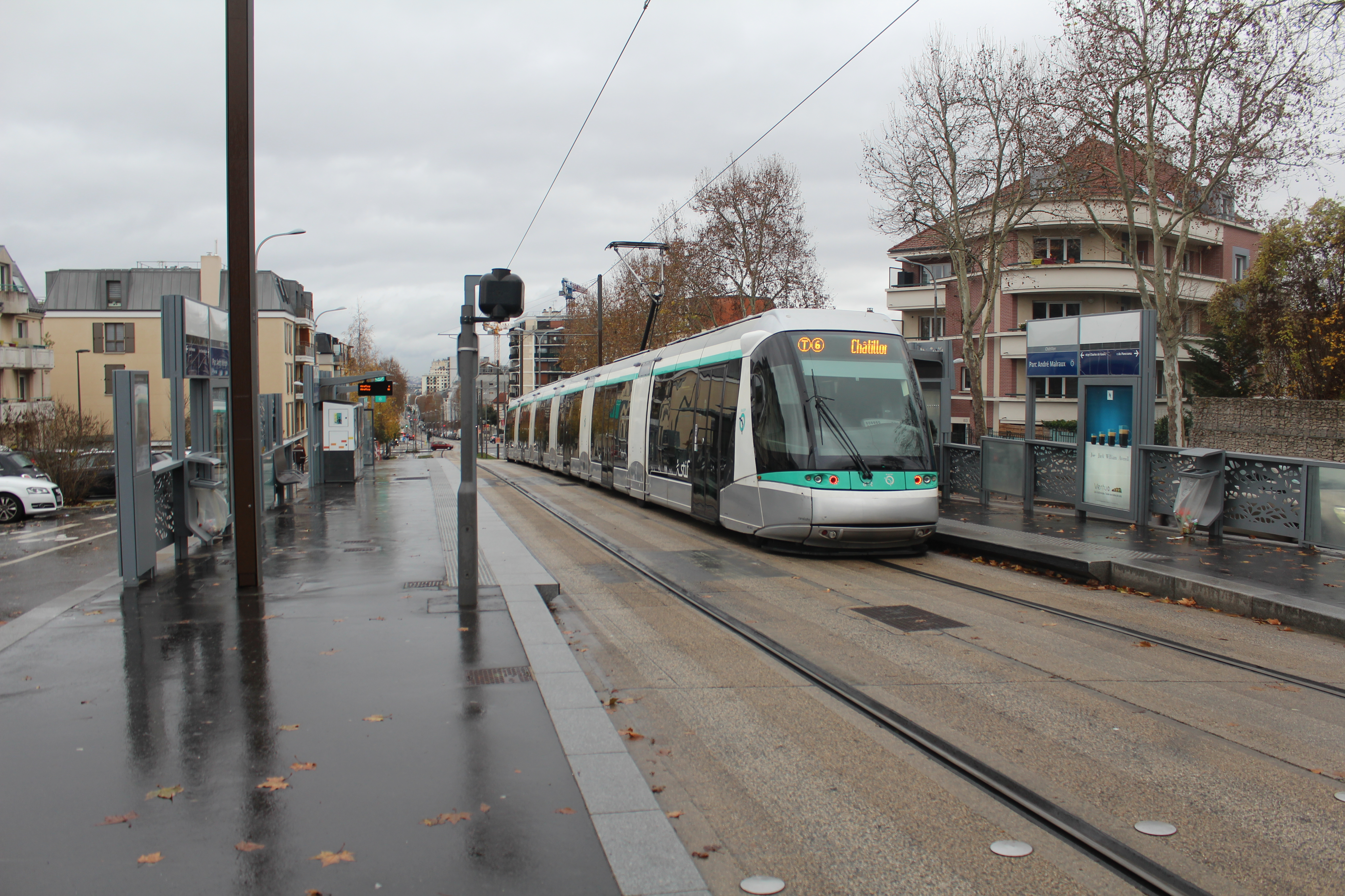 Station Parc André Malraux de la ligne 6 du tramway, Châtillon, Hauts-de-Seine.